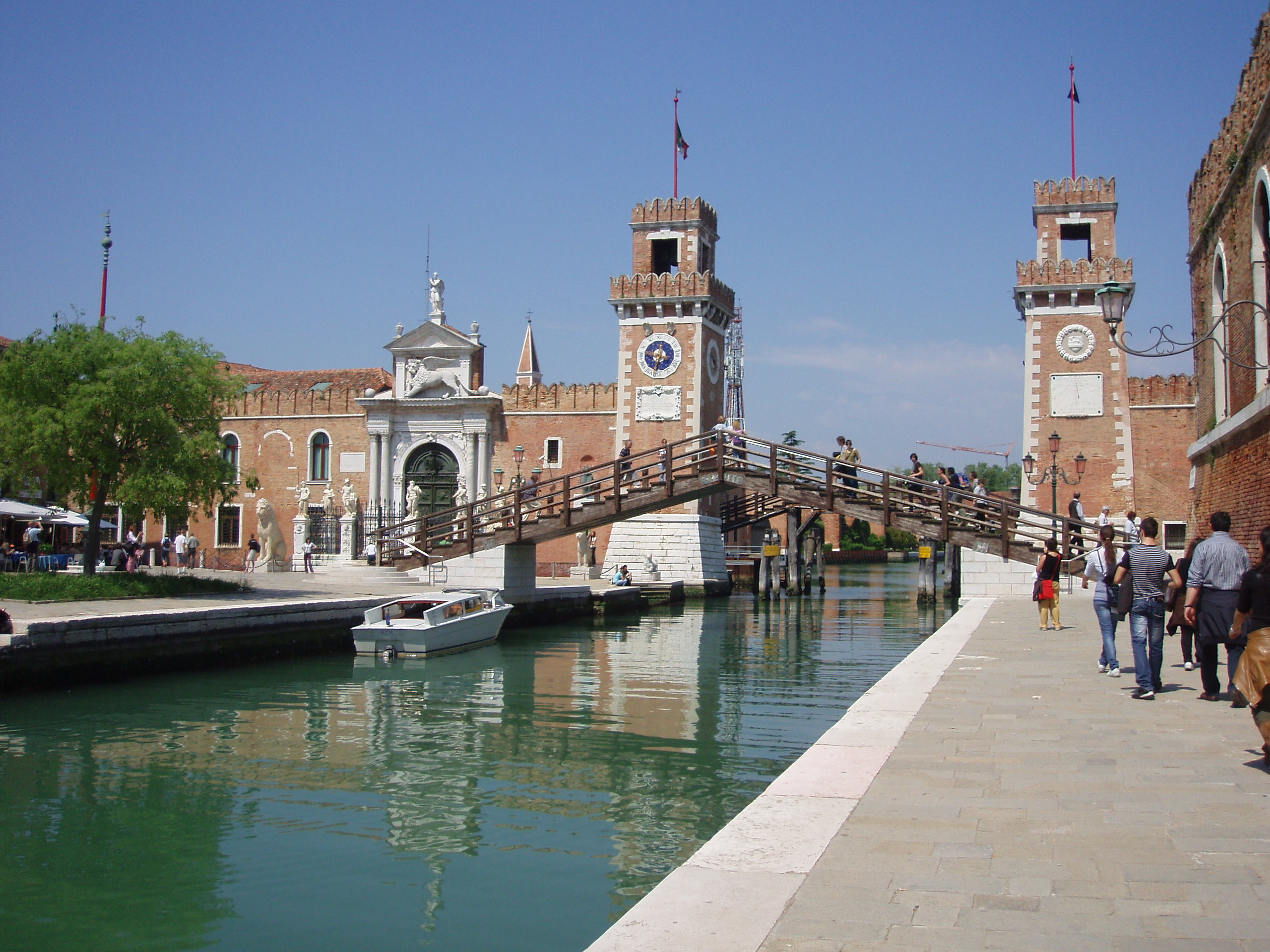 arsenal